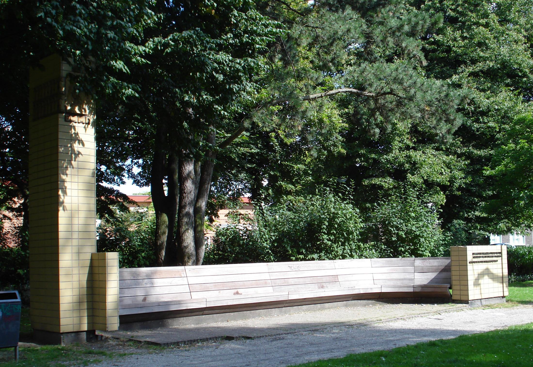 Schiedam, Julianapark. Kunstwerk "Emmabank". Schiedam/The Netherlands.